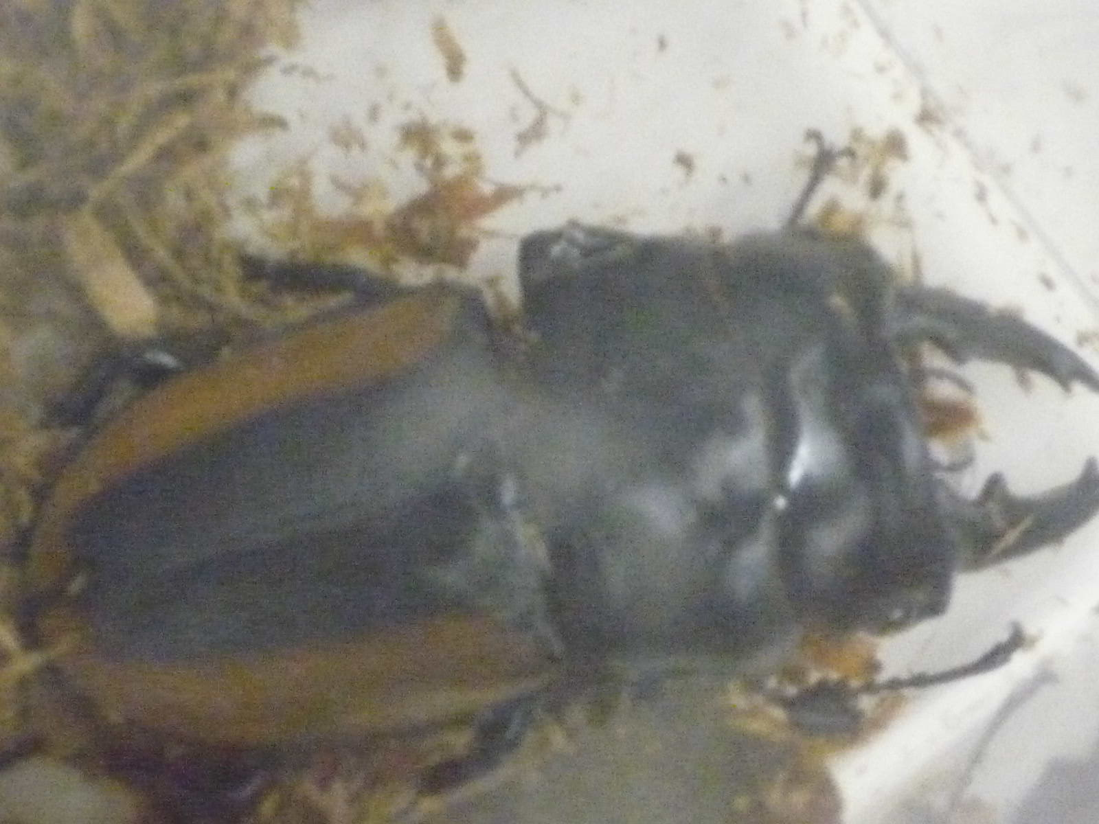 相模原ふれあい科学館で夏に開催されていた特別展に出ていました。